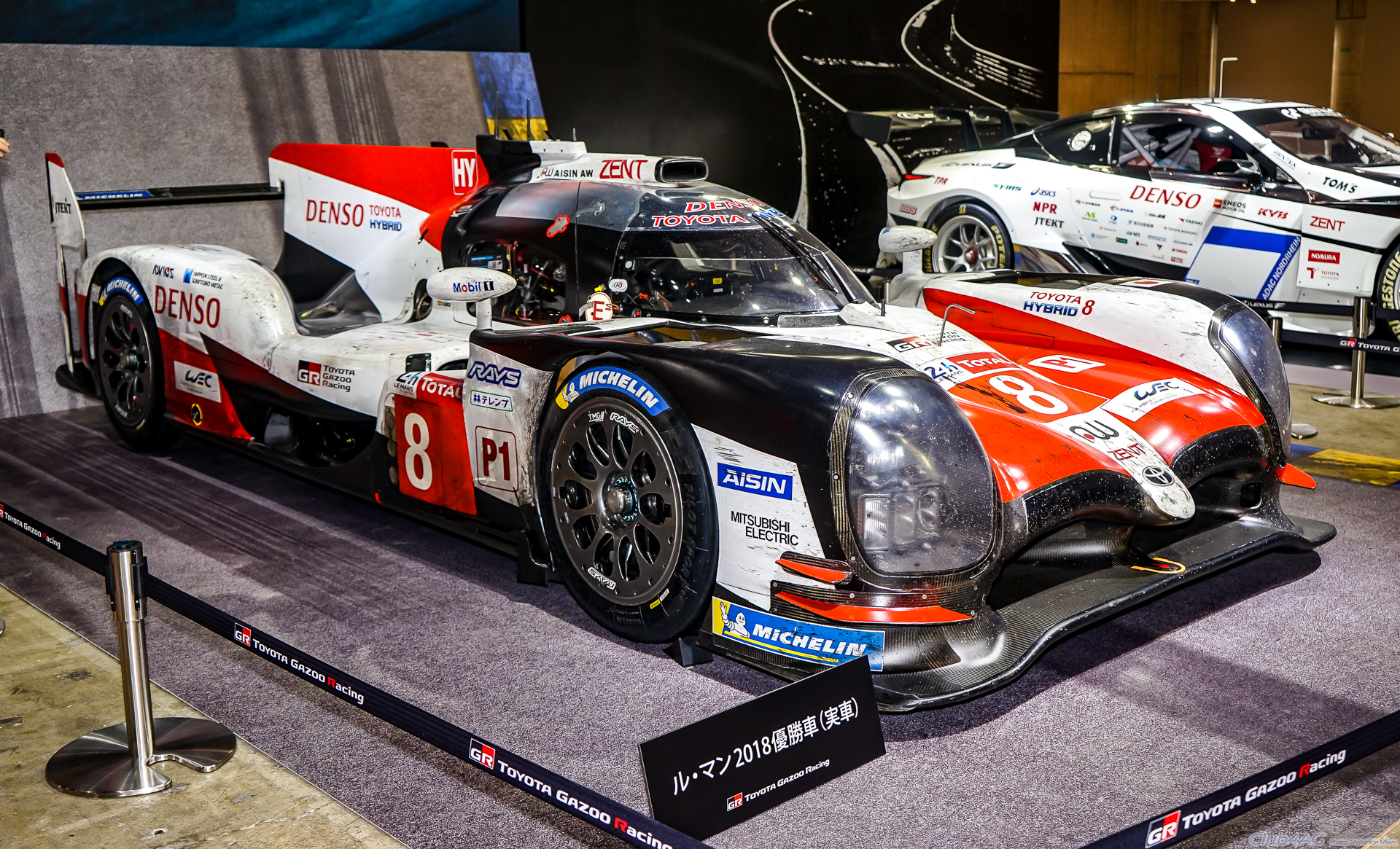 Tokyo Auto Salon 2019